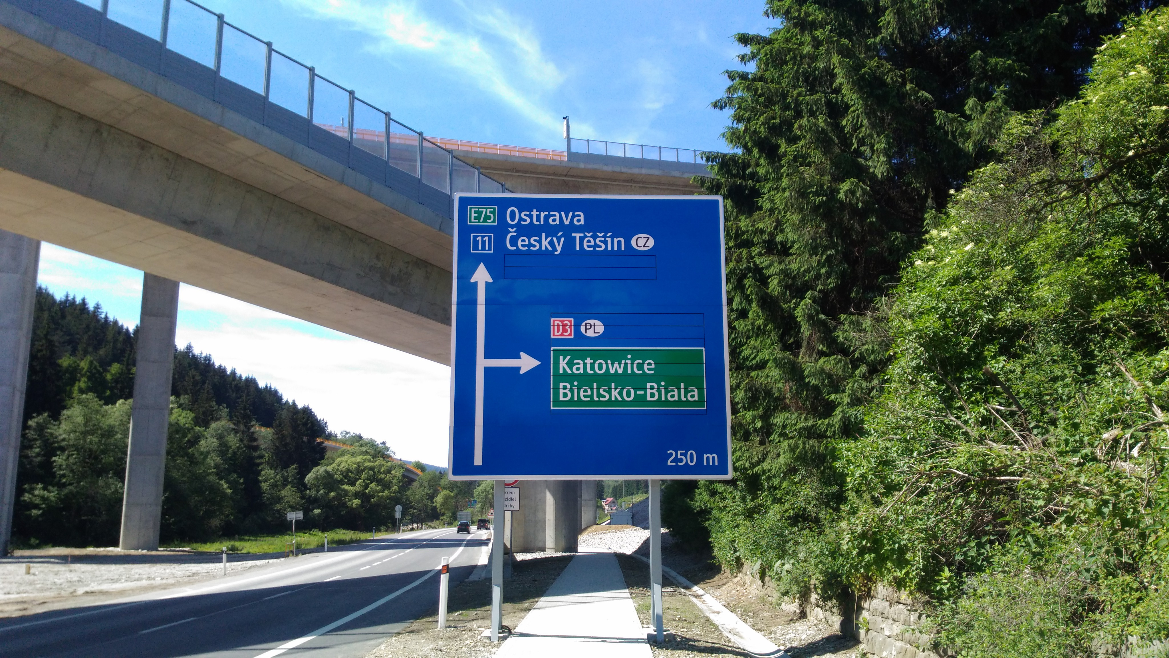 Slovenská dopravní značka IS 9 (Návestná tabuľa) s použitím fontu Tern (silnice I/11, Svrčinovec).